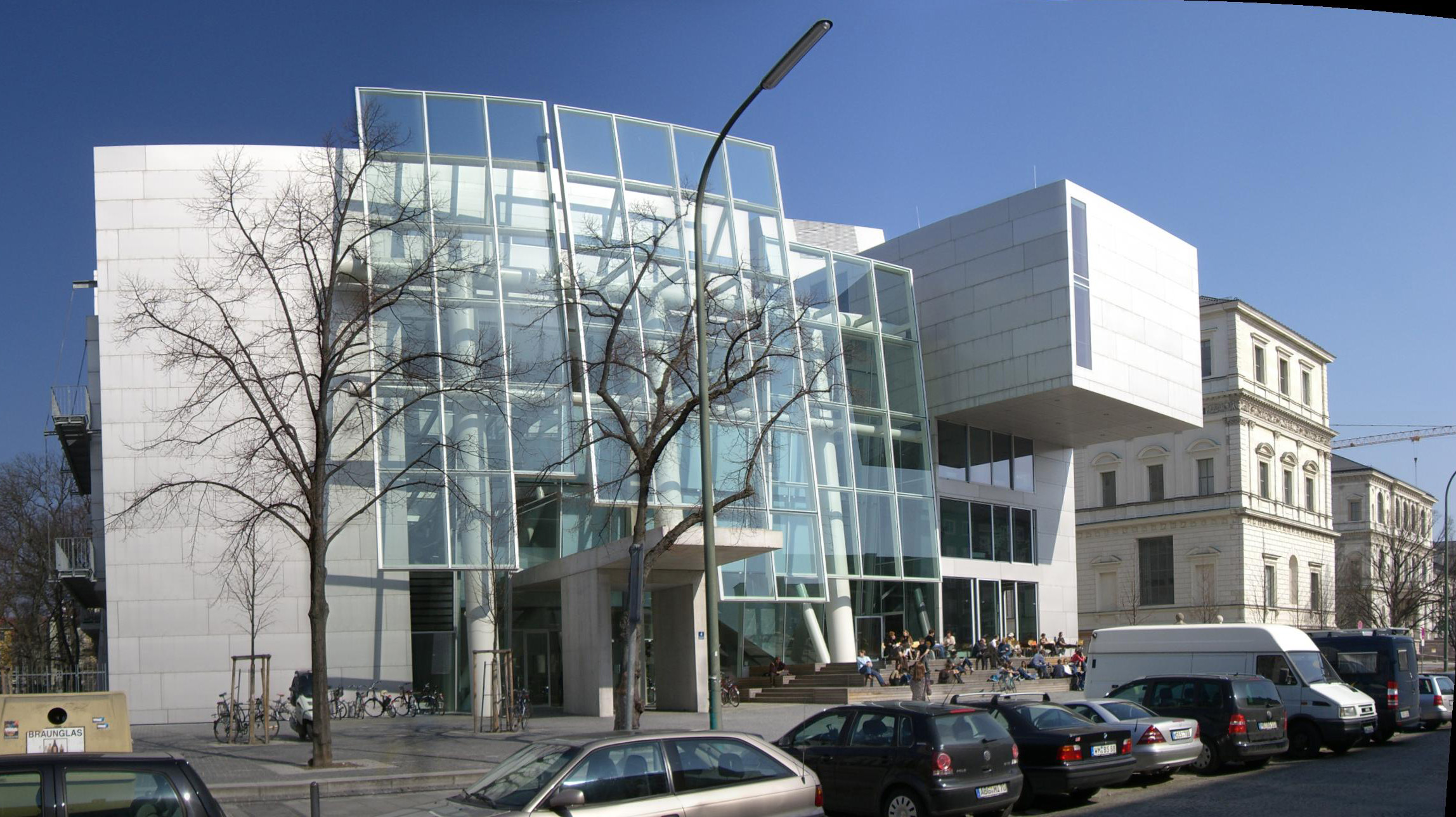 Akademie der Bildenden Künste München (Erweiterungsbau) — bestimmt dadurch Coop Himmelb(l)au (2005).